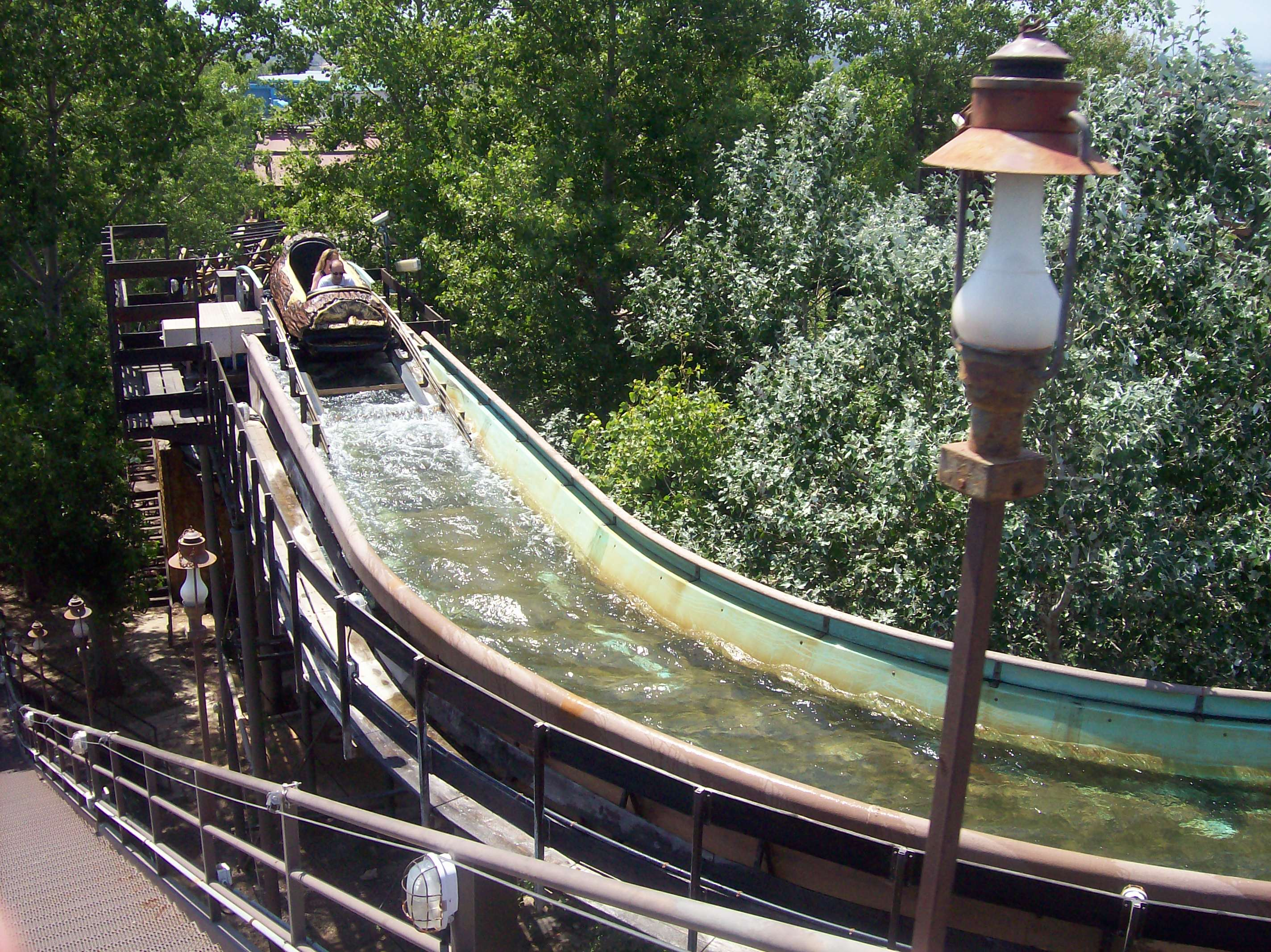 Silver River Flume in Port Aventura